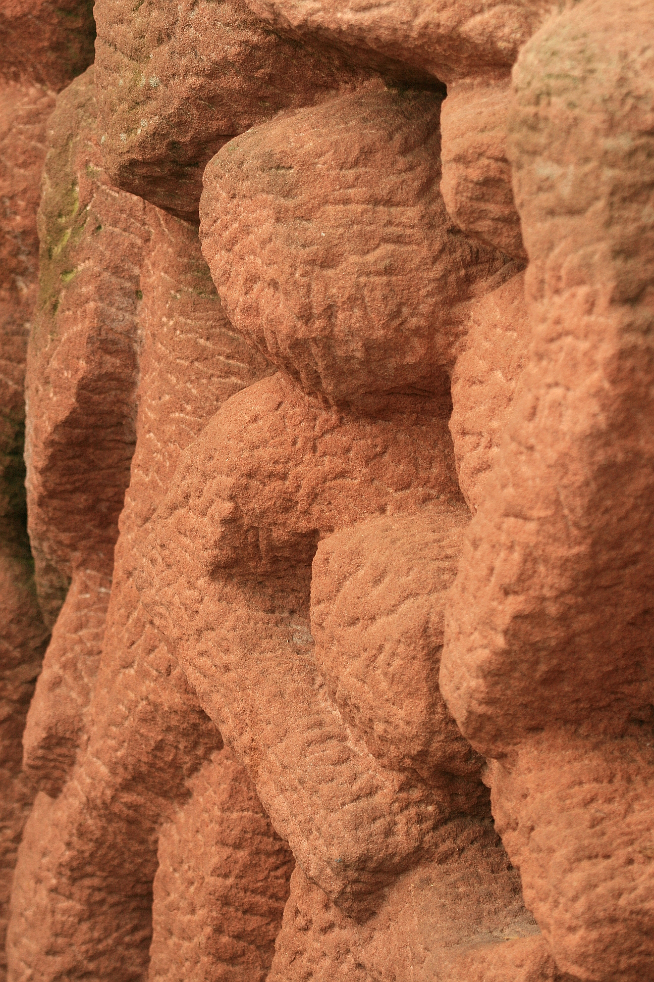 Porajmos,Denkmal Wiesbaden; die grob ausgeführten Figuren im unteren Bereich des Sandsteinblocks